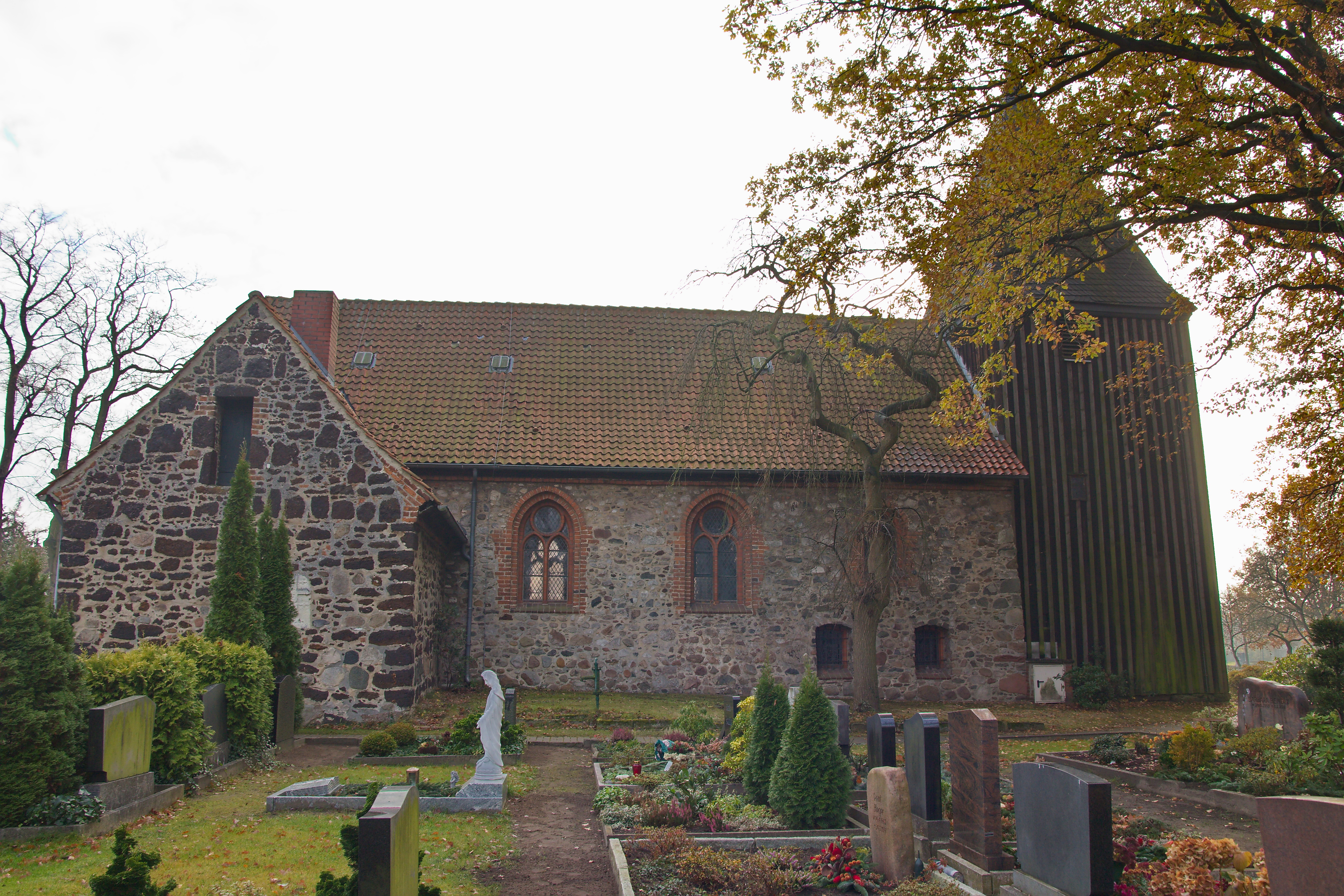 Rückseite der St. Nikolaikirche in Kirchhorst (Isernhagen), Niedersachsen, Deutschland